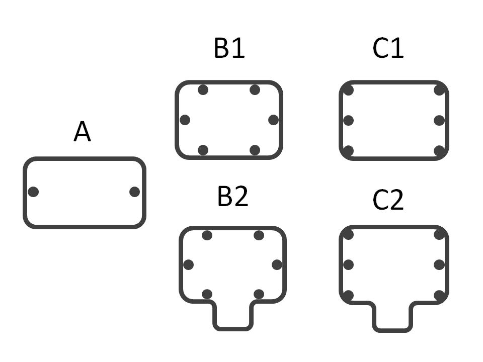 Hlavní typy chat v době římské a době stěhování národů (50/30BC - 600 AD) na území České republiky. Dle Droberjar 1997. A - pozdní latén/časná doba římská, B1 a B2 - doba římská a doba stěhování národů, C1 a C2 - pozdní doba římská a doba stěhování národů.